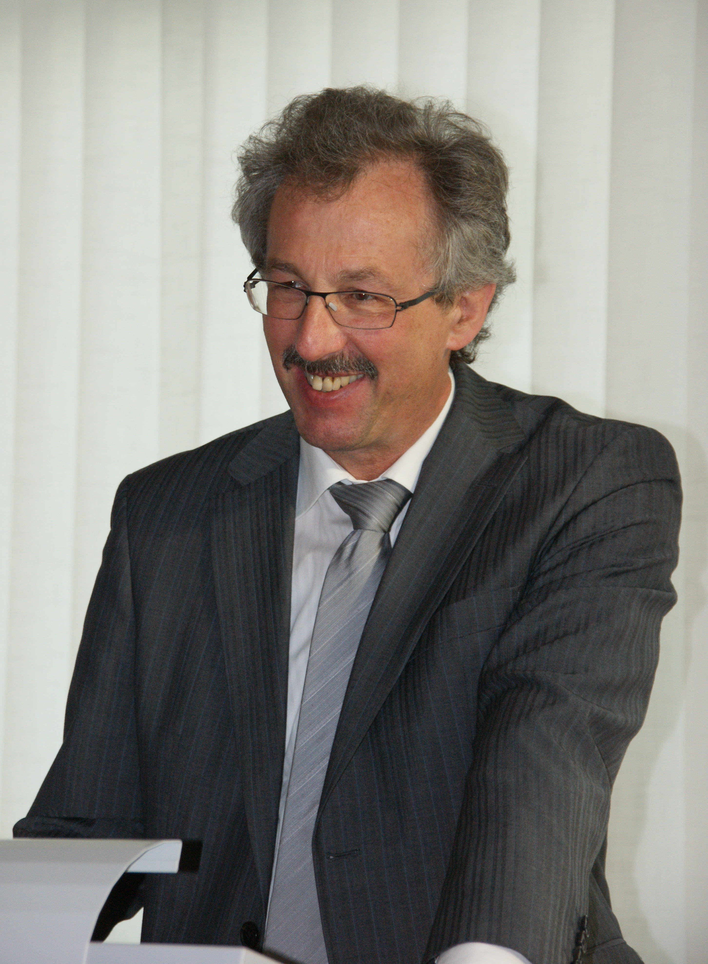 Jürgen Fohrmann, visit at the CJD Christophorusschule Königswinter